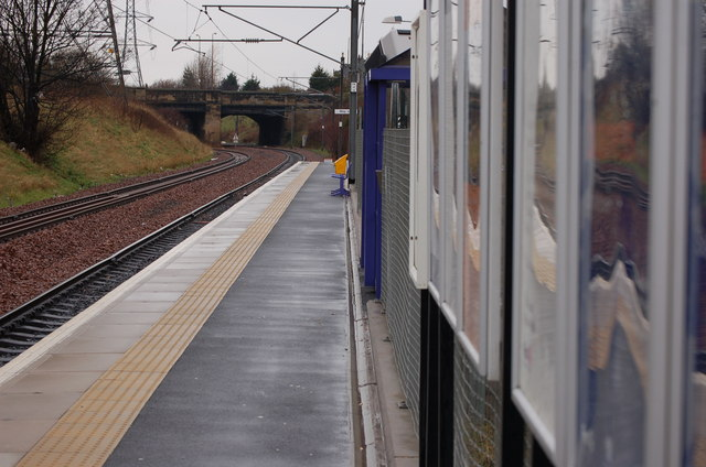 Brunstane Station